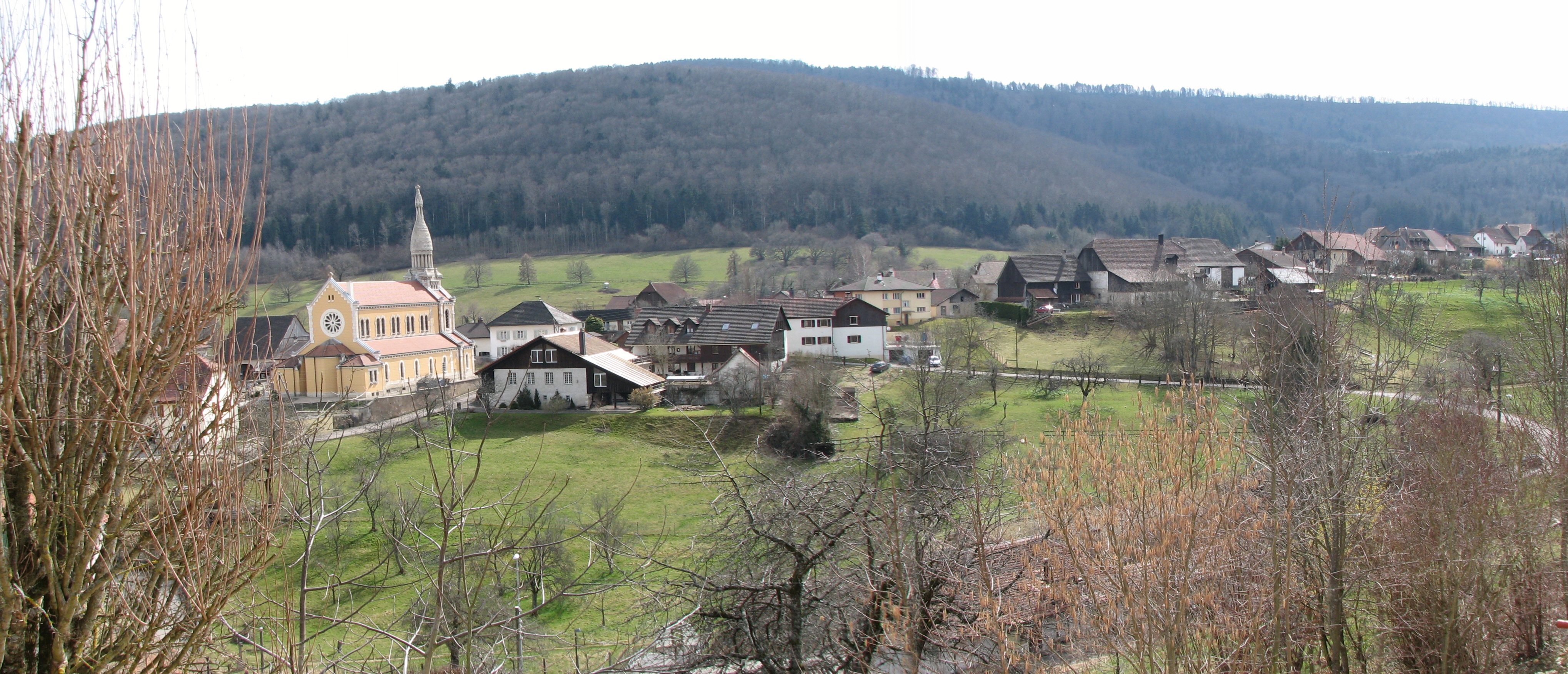 Bressaucourt vue générale